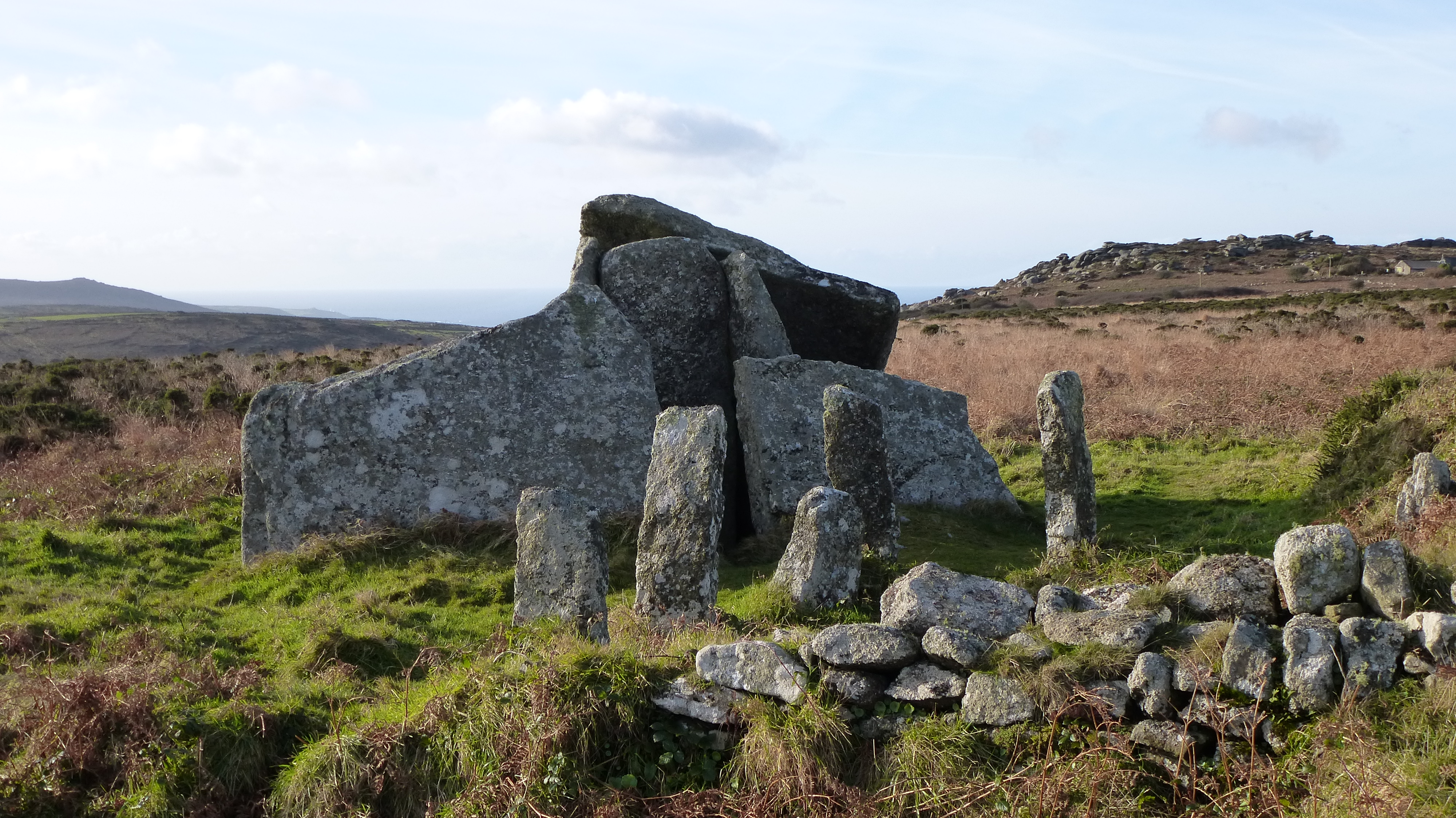 Zennor Quoit.